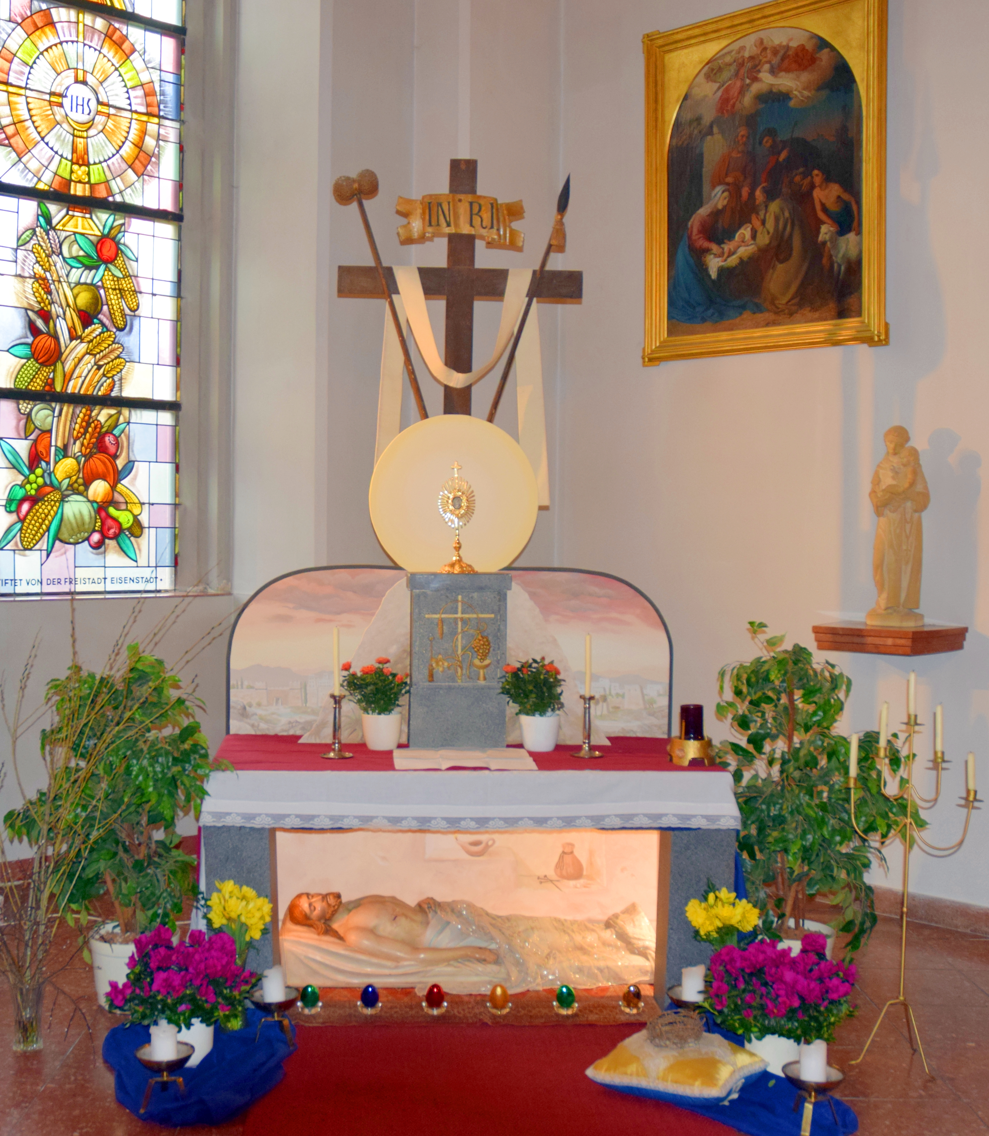 Das Hl. Grab in der Kapelle der Martinkaserne in Eisenstadt, gestaltet von Markus Kniepeiß